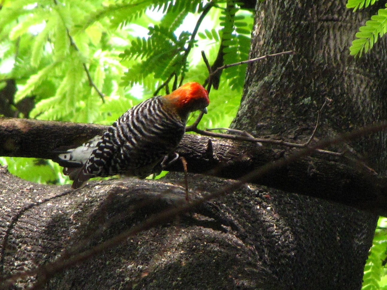 Melanerpes rubricapillus rubricapillus male Lugar / place / lieu : Cagua, Estado Aragua, Venezuela.